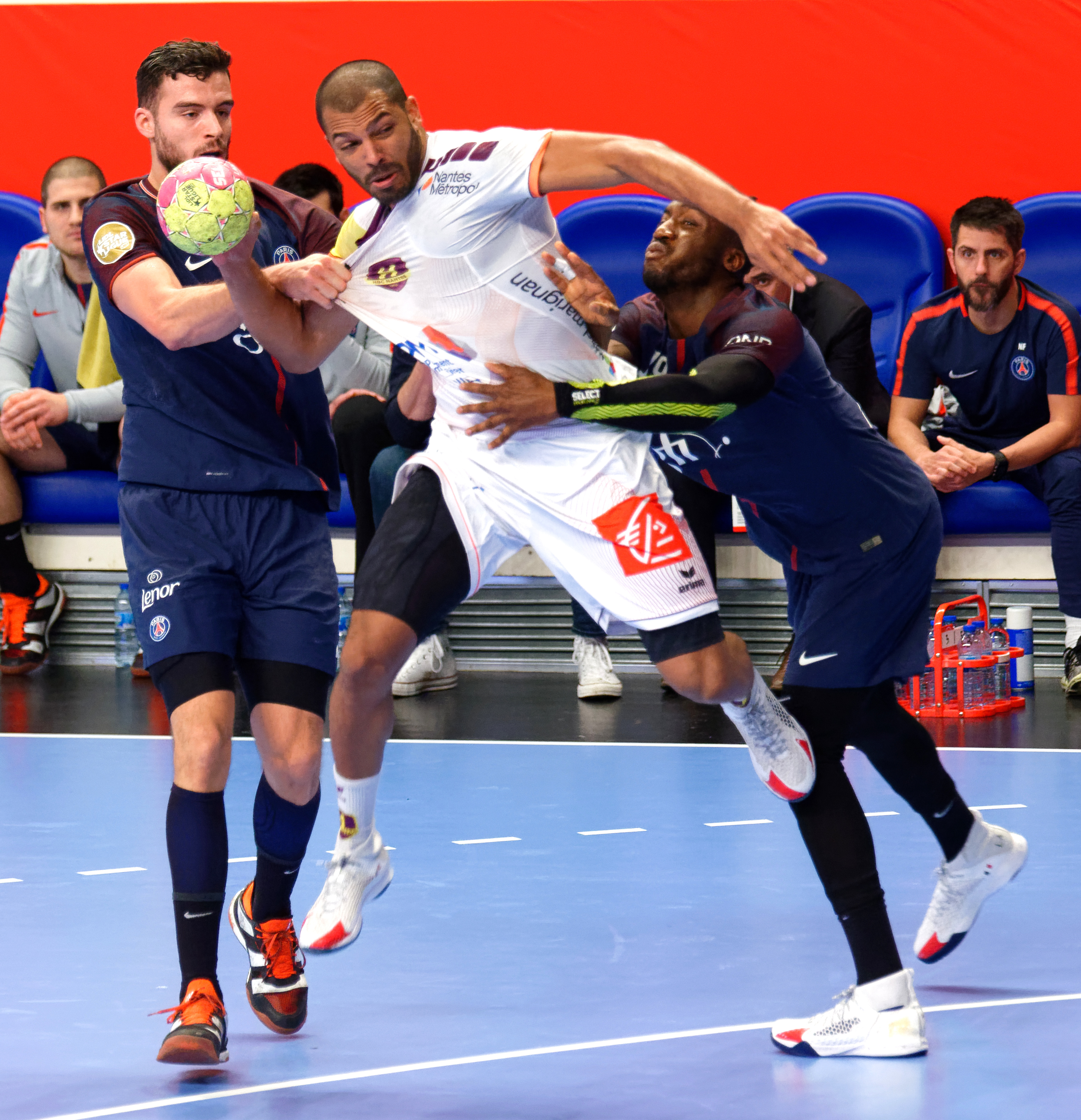 Quart de finale de la Coupe de la Ligue entre le PSG et le HBC Nantes. A Coubertin, le 14 décembre 2017.